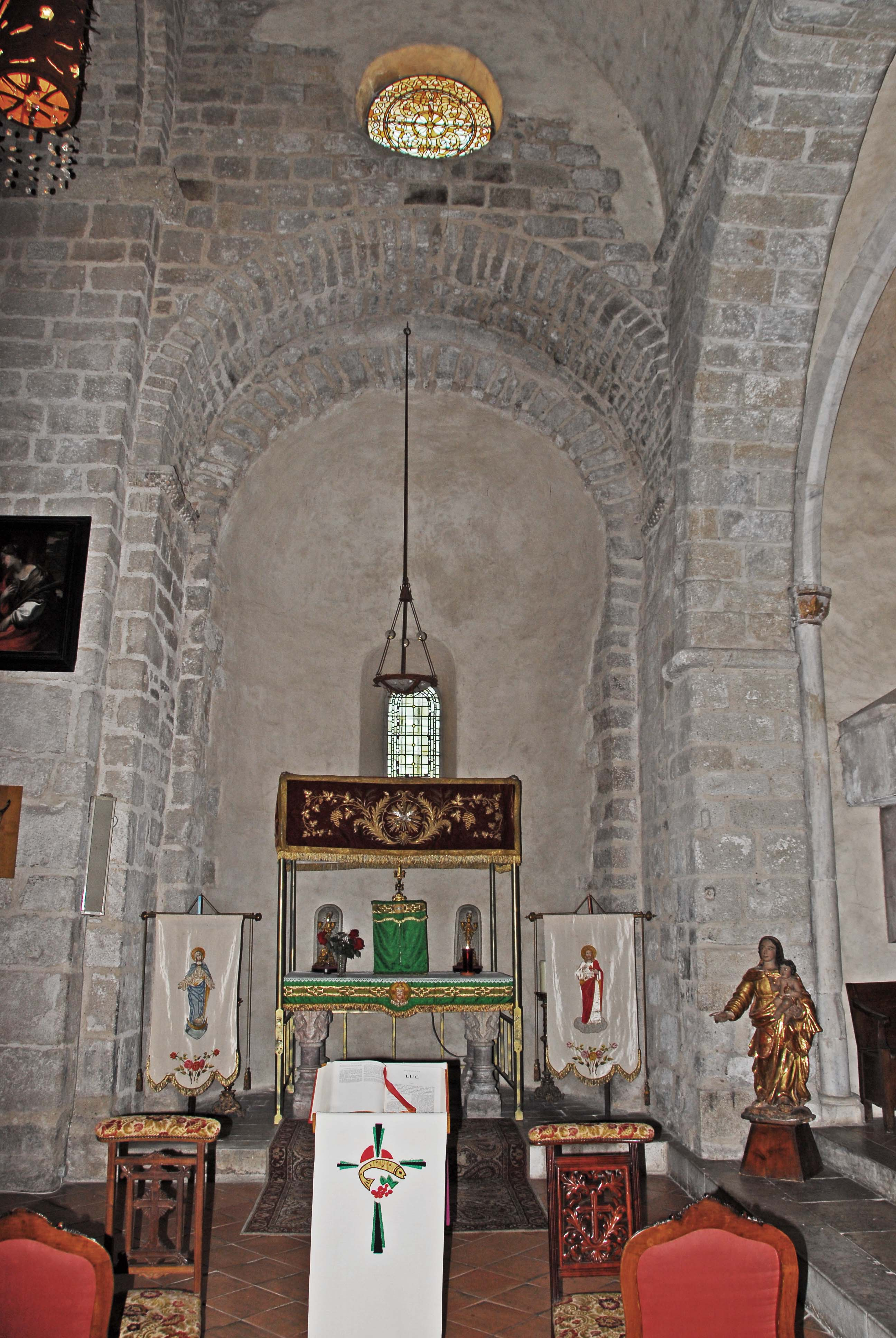 Ste-Eulalie-et-Ste-Julie_d’Elne, südl. Apsidiole aus eüdl. Seitenschiff